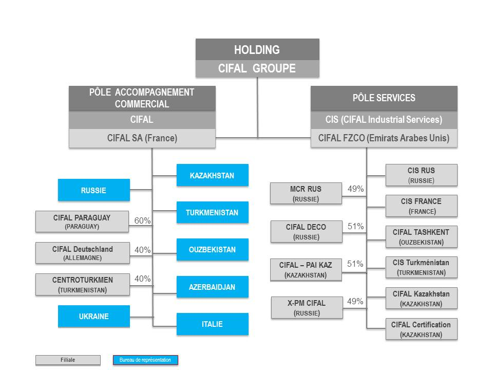 Organigramme du Groupe CIFAL (automne 2012)